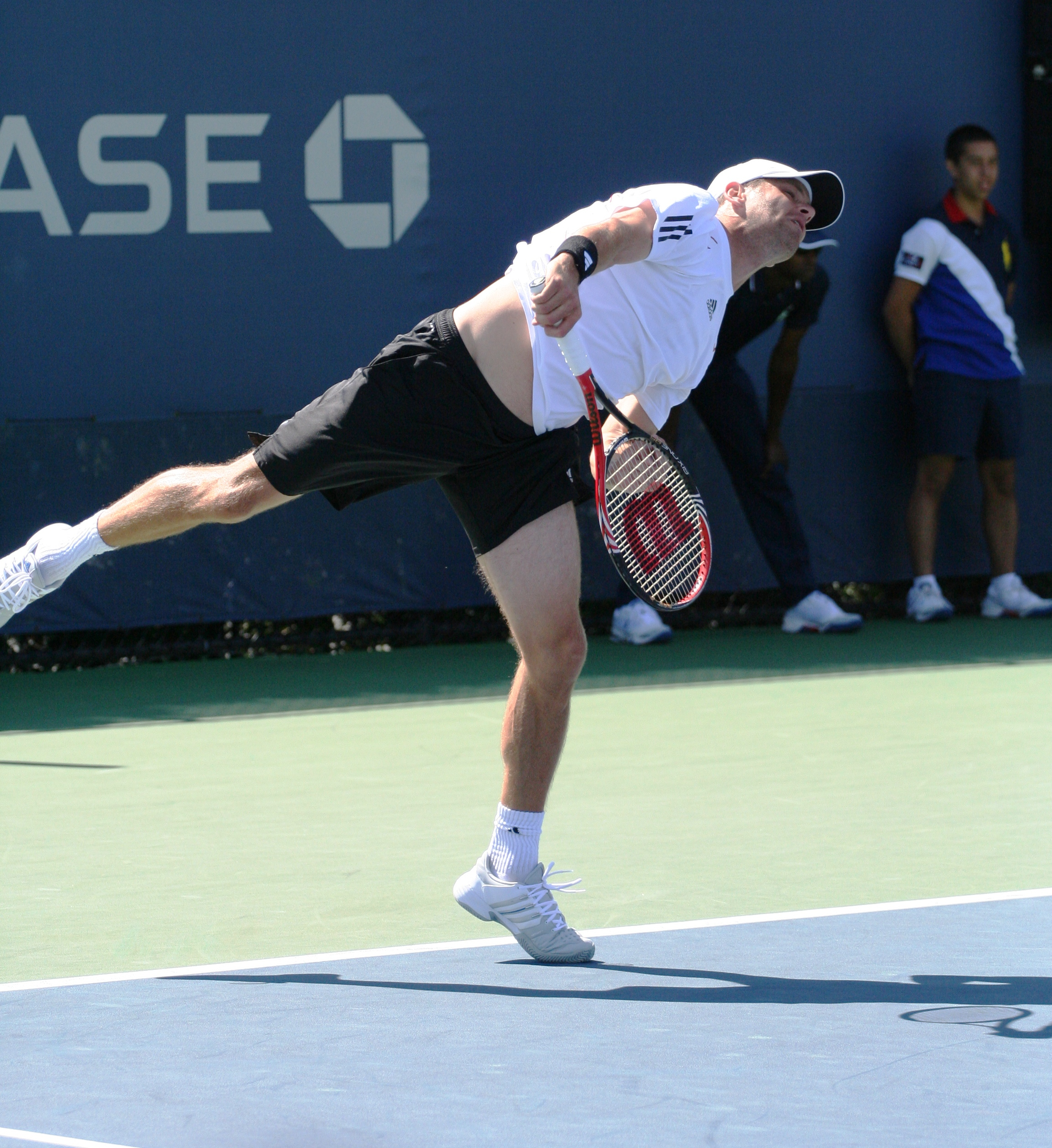 U.S. Open Saturday, Sept. 4, 2010